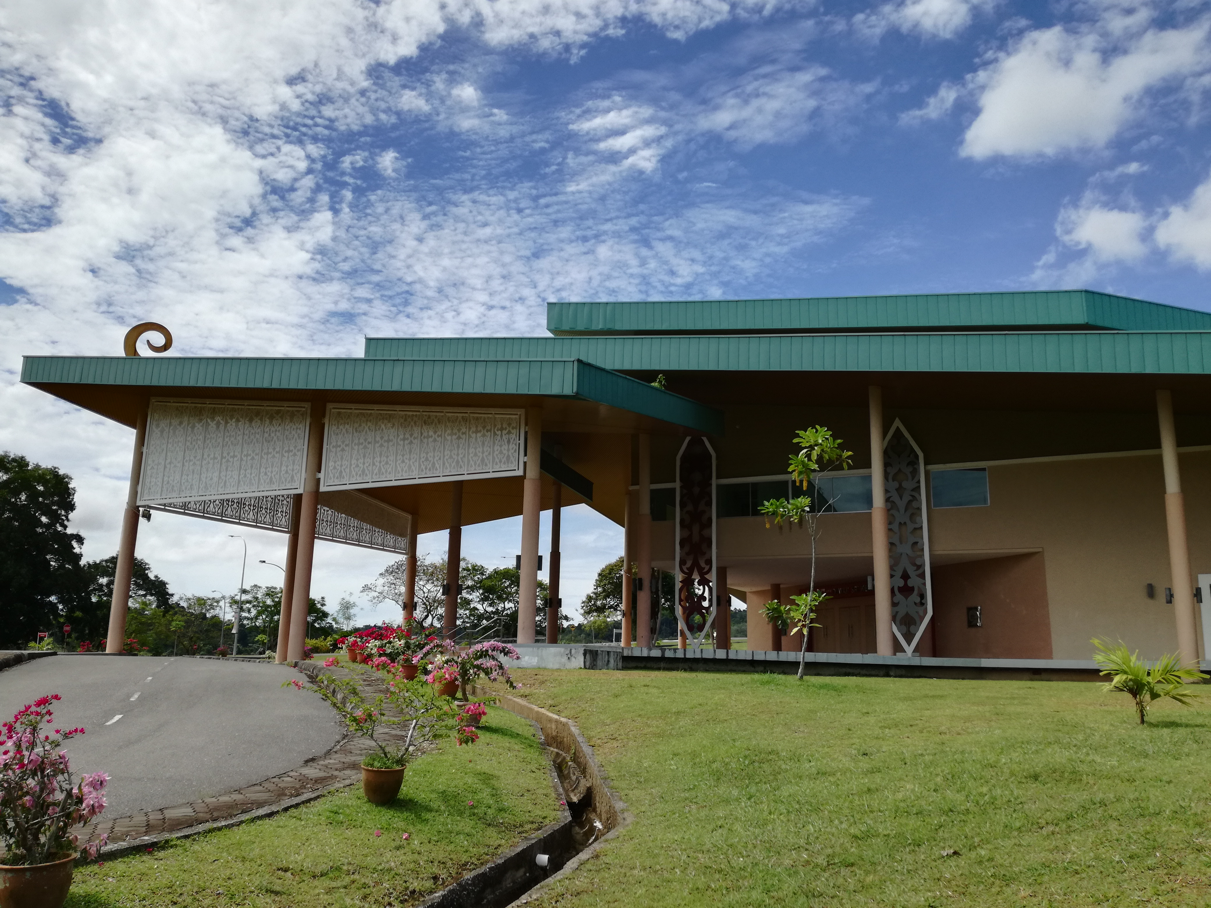 Dewan Sri Kenyalang merupakan dewan utama di dalam kampus, rupa bentuk dan corak bangunan ini mendapat ilham daripada burung Kenyalang.